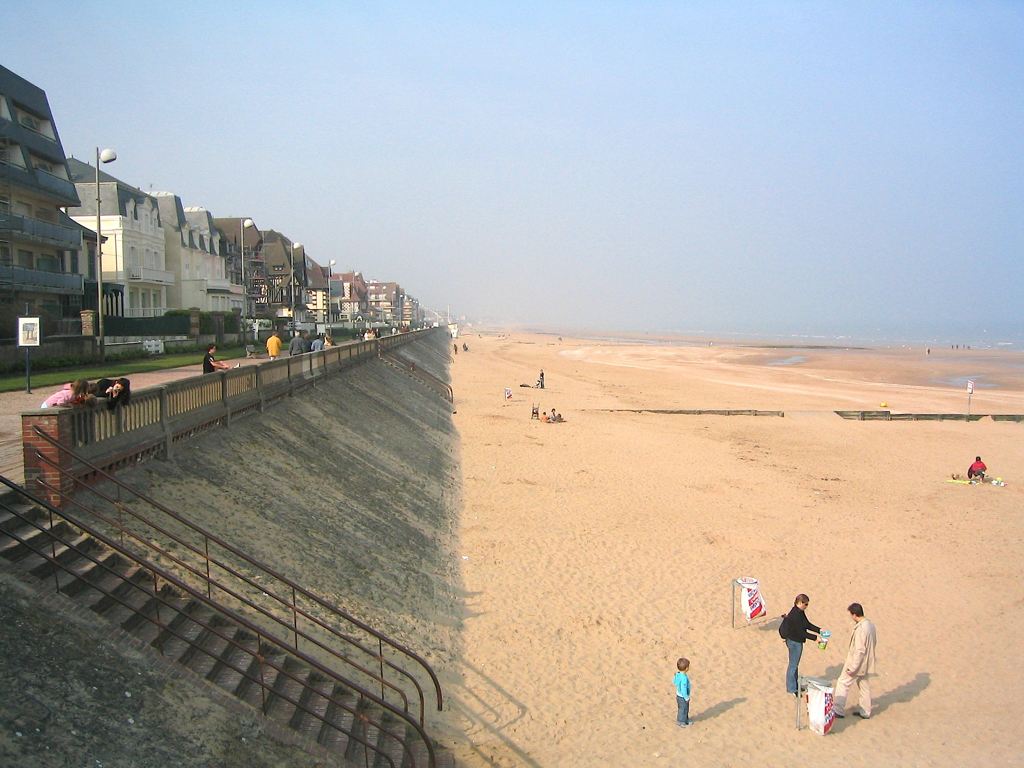 Vista parcial de la costa de la localidad francesa de Cabourg (Calvados, Francia).